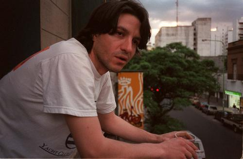 Manuel Moretti mirando por la ventana